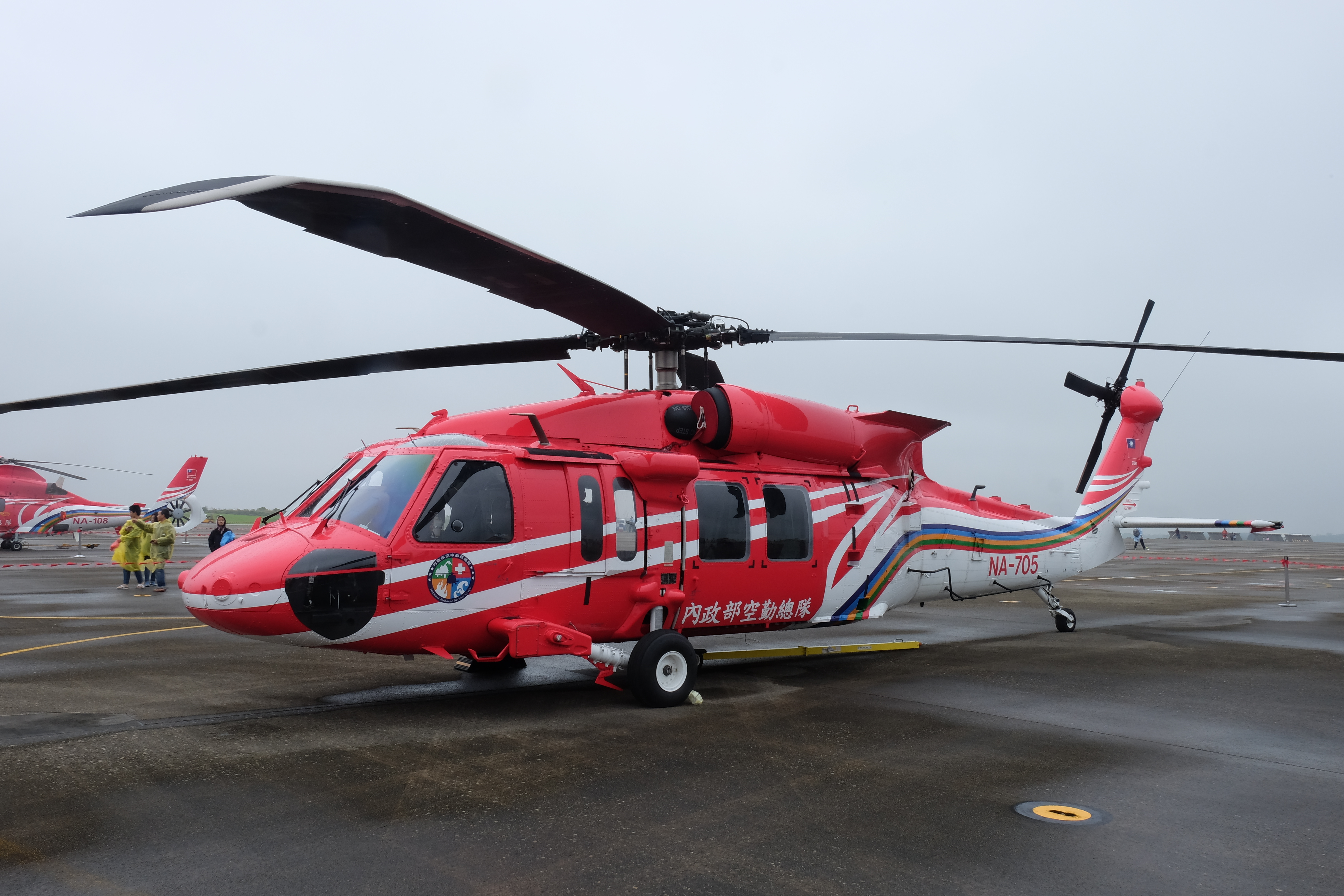 2016年空軍清泉崗基地營區開放活動下午，會場北部靜態展示的內政部空勤總隊UH-60M NA-108左側。